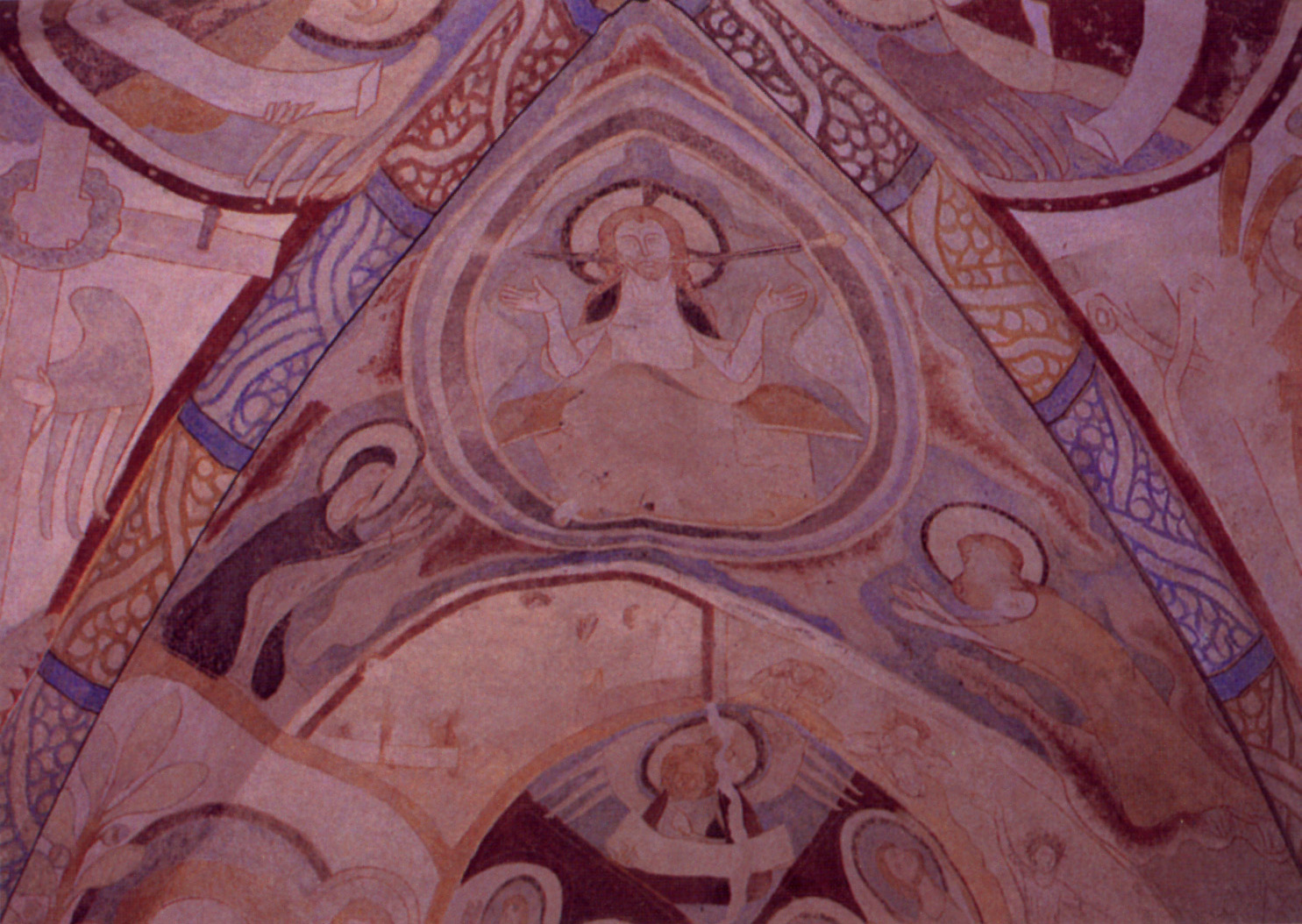 Malereien im Kirchturm von Hottenbach (1290)